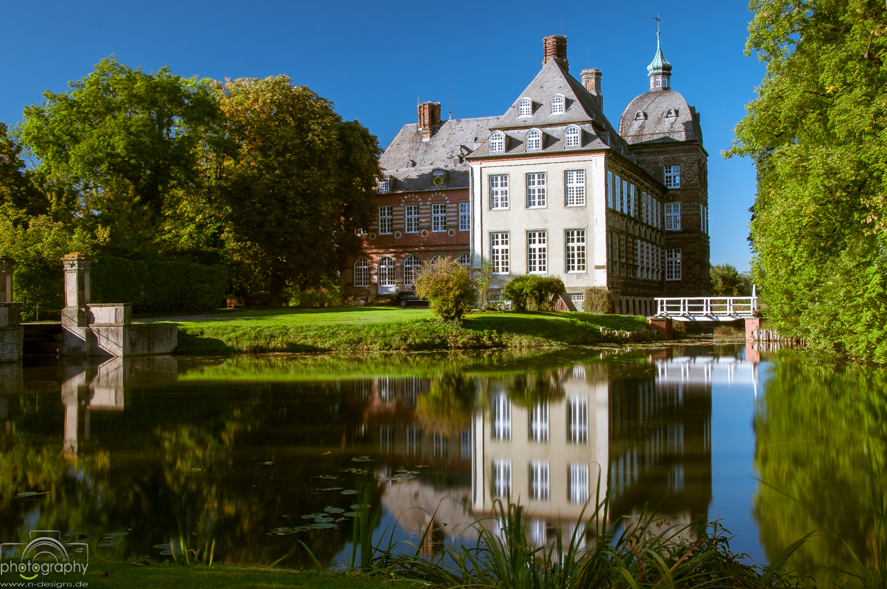 Langzeitbelichtung Schloss Hovestadt